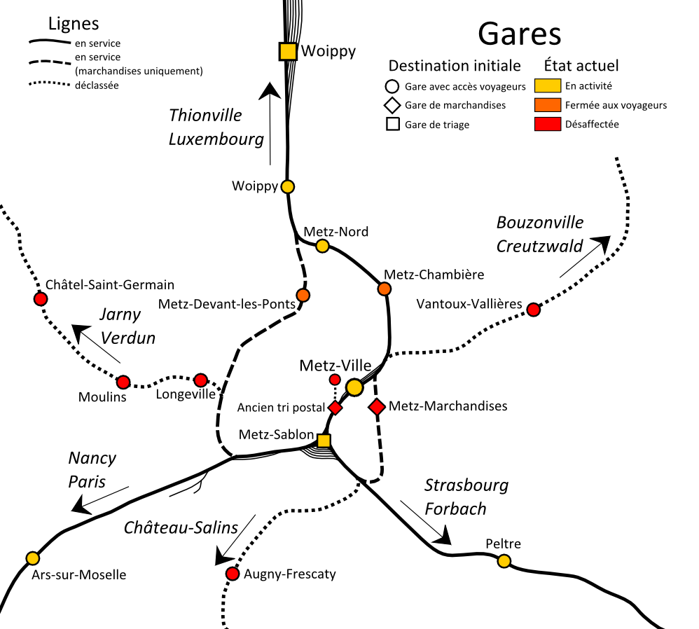 Voies Ferrées Gare de Metz